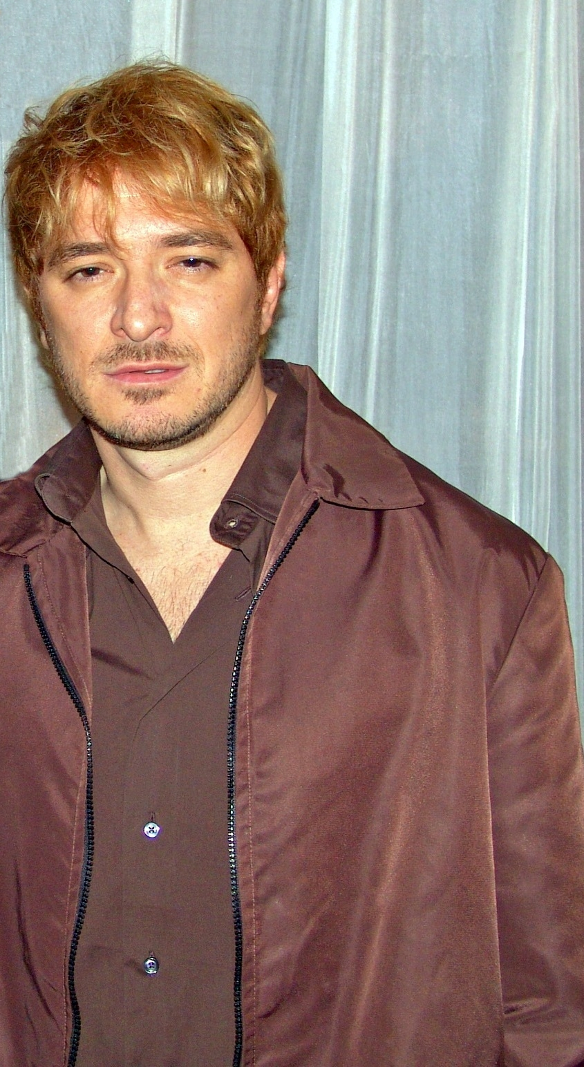 Guilherme Piva em 2006.